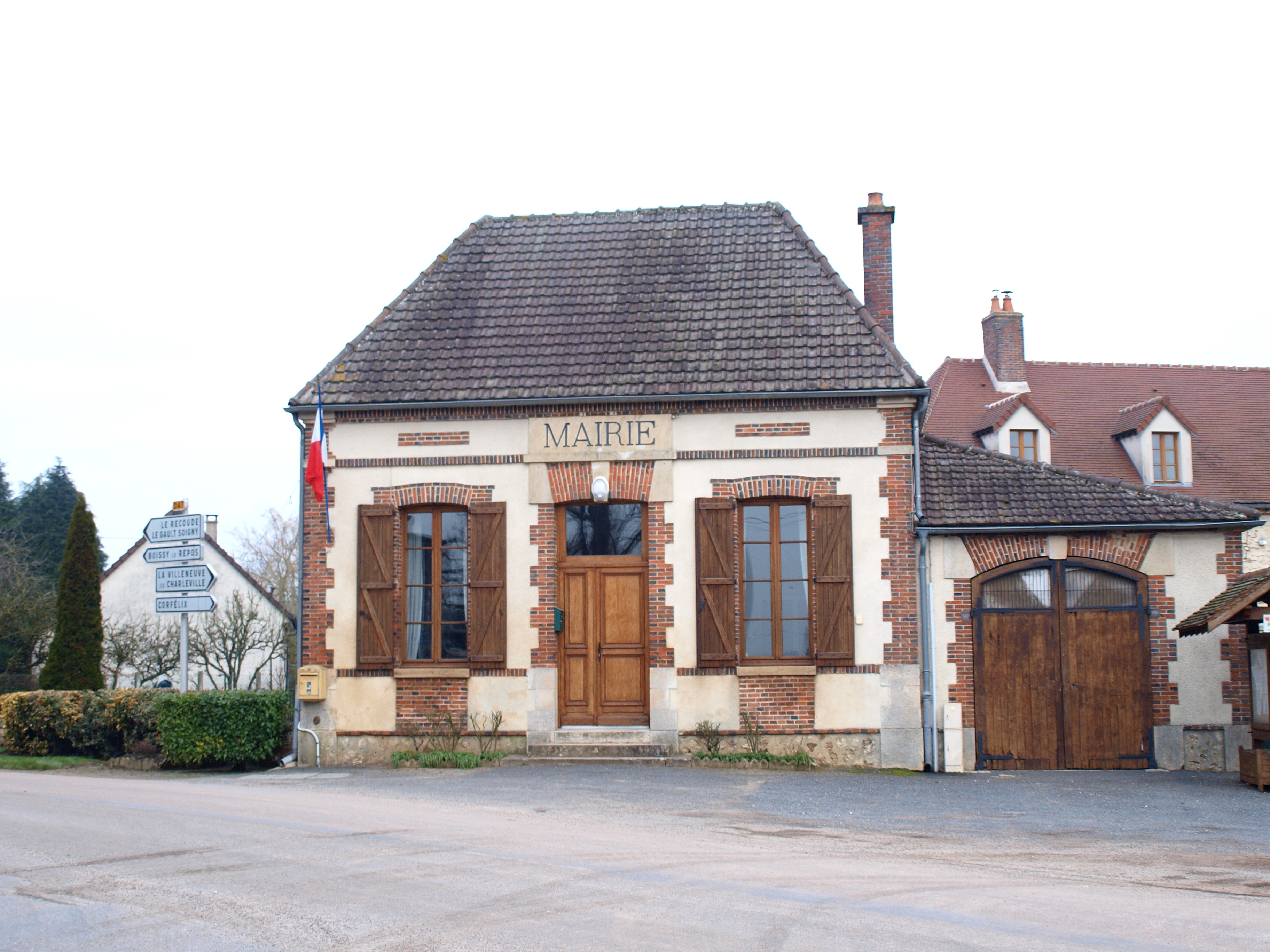 Charleville (Marne, France) ; mairie